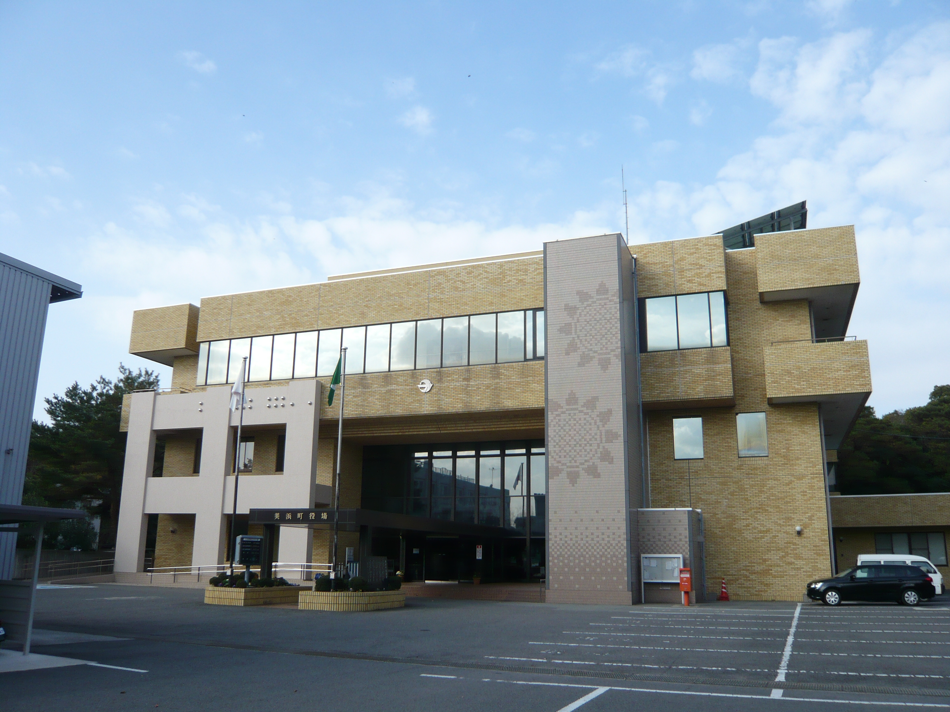 美浜町役場